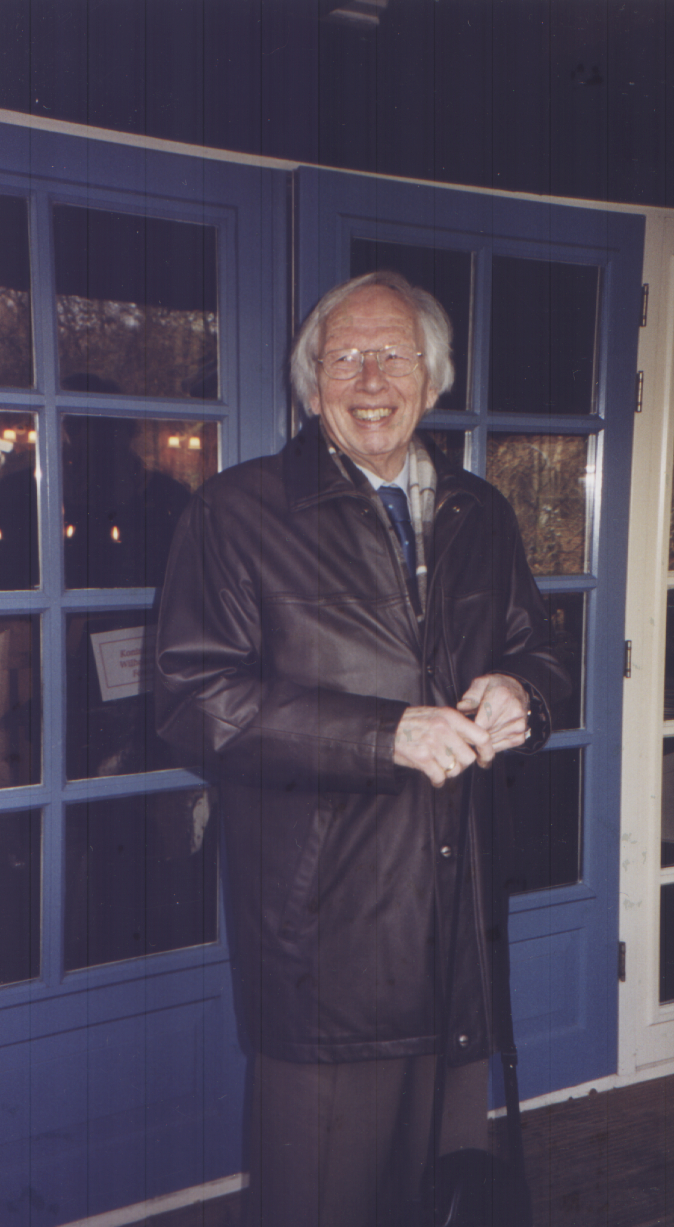 Jacques Reuland in 2004